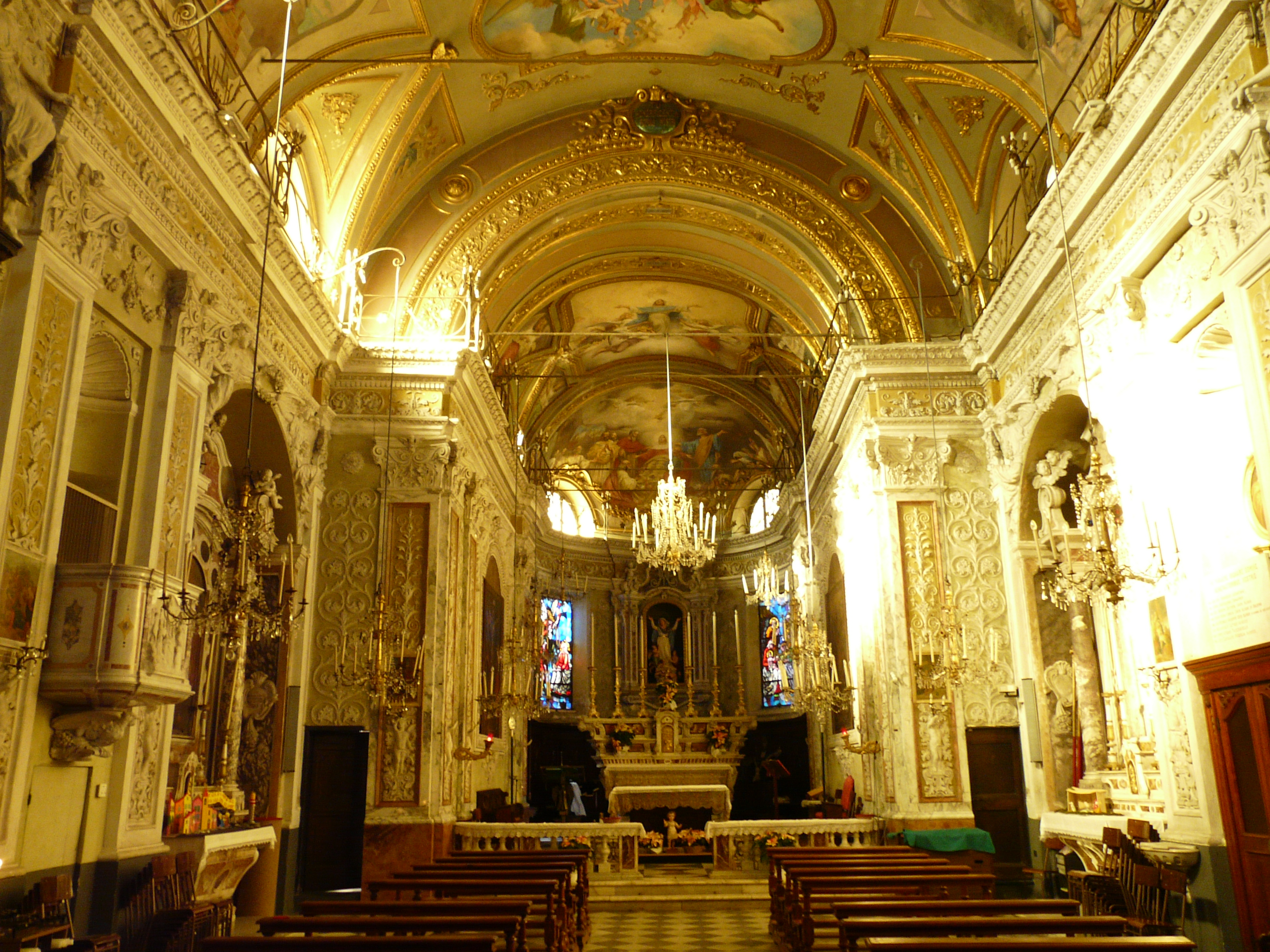 Navata centrale della chiesa di Nostra Signora Assunta, Santa Maria del Campo, Rapallo, Liguria, Italia